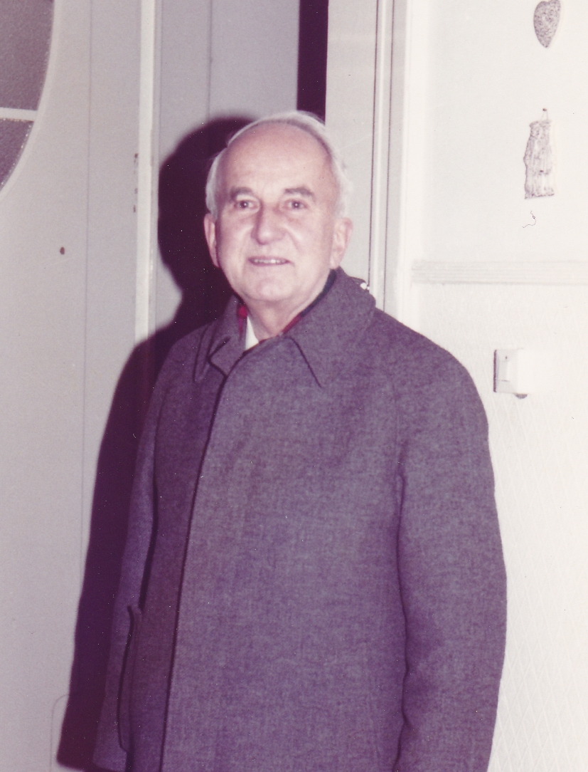 Lothar Collatz 1984 beim Jahresempfang von Ulrich Eckhardt